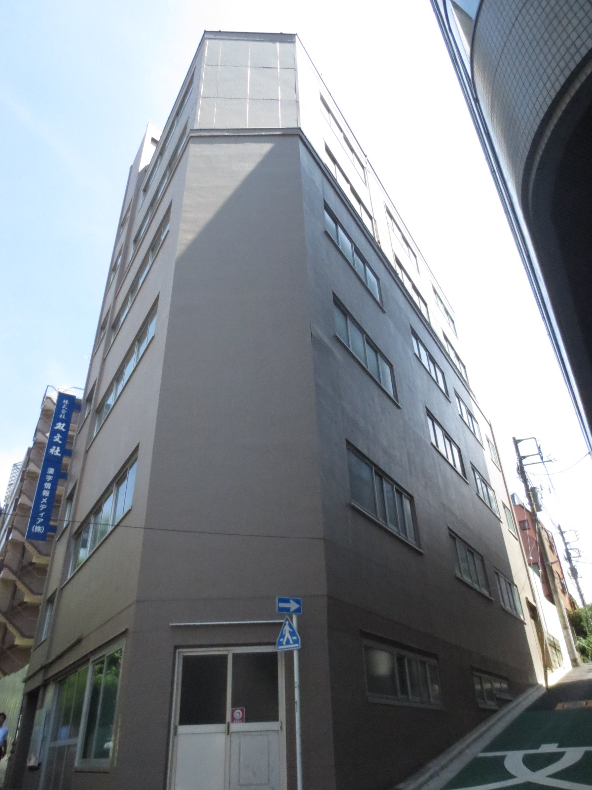 本郷の旧エイコー本社ビル。